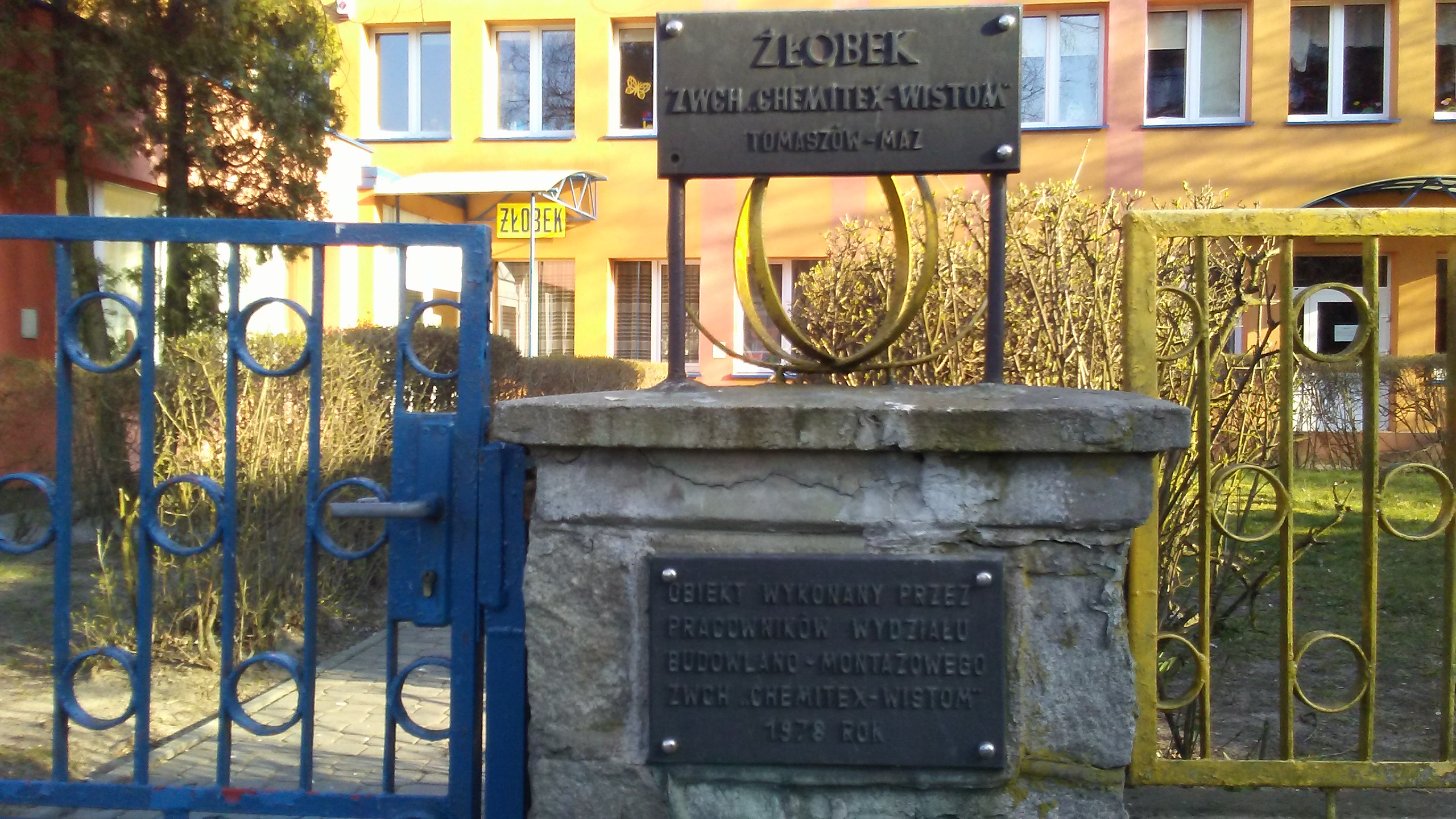 Wybudowany przez Wistom (TFSJ) w 1978 roku żłobek przy ulicy Strzeleckiej w Tomaszowie Mazowieckim